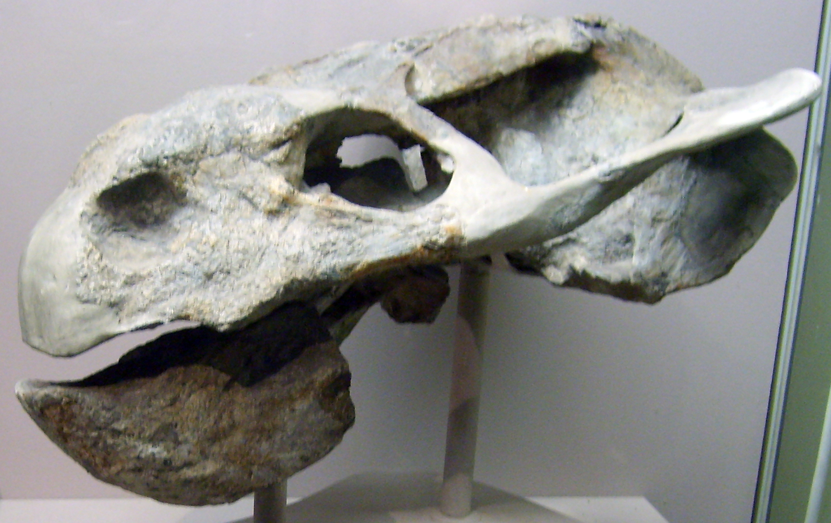 Oudenodon baini skull at the Museum für Naturkunde, Berlin.